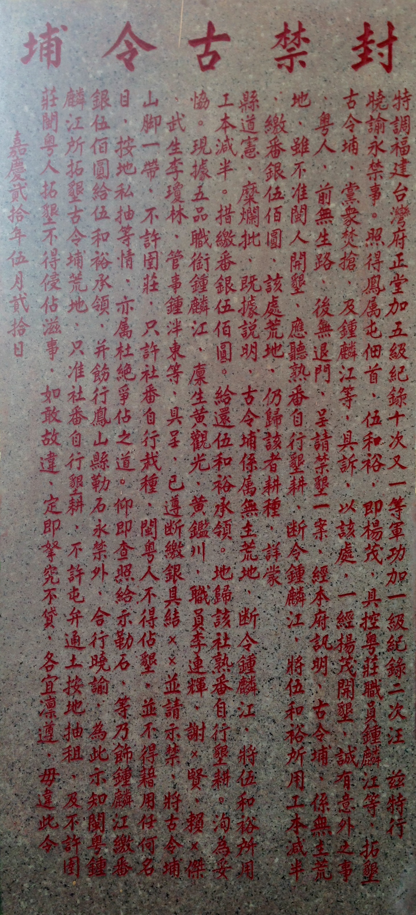 中文（台灣）: 六堆天后宮的封禁古令埔碑 特調福建臺灣府正堂、加五級、紀錄十次、又一等軍功、加一級、紀鏈二次汪，為特行曉諭永禁事。照得鳳屬屯佃首伍和裕（即楊茂）具控粵莊職員鍾麟江等「妨墾古令埔、黨眾焚搶」，及鍾麟江等具訴「以該處一經楊茂開墾，設有意外之事粵人前無生路、後無退門，呈請禁墾」一案。經本府訊明：古令埔係無主荒地，雖不准閒人開墾，應聽熟番自行墾耕；斷令鍾麟江將伍和裕所用工本滅半繳還伍百員，該處荒埔斷歸該番耕種。詳蒙臬道憲糜批：「既據訊明古令埔係屬無主荒地，斷令鍾麟江將伍和裕所用工本減半持繳番銀五百○類，給還伍和裕承領；地歸該社熟番自行墾耕，洵均妥協。現據五品職銜鍾麟江、廪生黃觀光、黃鑑川、職員李連程、謝儲賢、賴啟傑、武生李瓊林、管事鍾泮東等具呈『北遵斷繳銀具結，聯名懇請示禁：將古令埔山脚一帶不許圍莊，只許社番自行栽種；閩、粵人不得佔墾，亦不許屯辦、通事、土目按地私抽』等情，亦屬杜絕爭佔之道。仰即查明給示，勒石永禁。仍將鍾麟江所繳番銀給還伍和裕承領，並飭行鳳山縣勒石永禁外，合行曉諭。」為此，示仰闔邑人等知悉：該處古令埔永禁開墾，准社番自行墾耕；不許軍弁、通、土按地抽租，亦不許圍莊，閩、粵人等不得侵佔滋事。如敢故違，定即拏究不貸。各宜凜遵，毋違此令